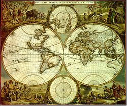 Mapa do mundo de Frederik de Wit, publicado em 1662 no apogeu do Século de Ouro dos Países Baixos para um grande centro de edição geográfico da época, simbolizando a preponderância econômica, cultural e artística do país, elevado ao ranque de potência mundial e que dominava a cartografia por si própria.